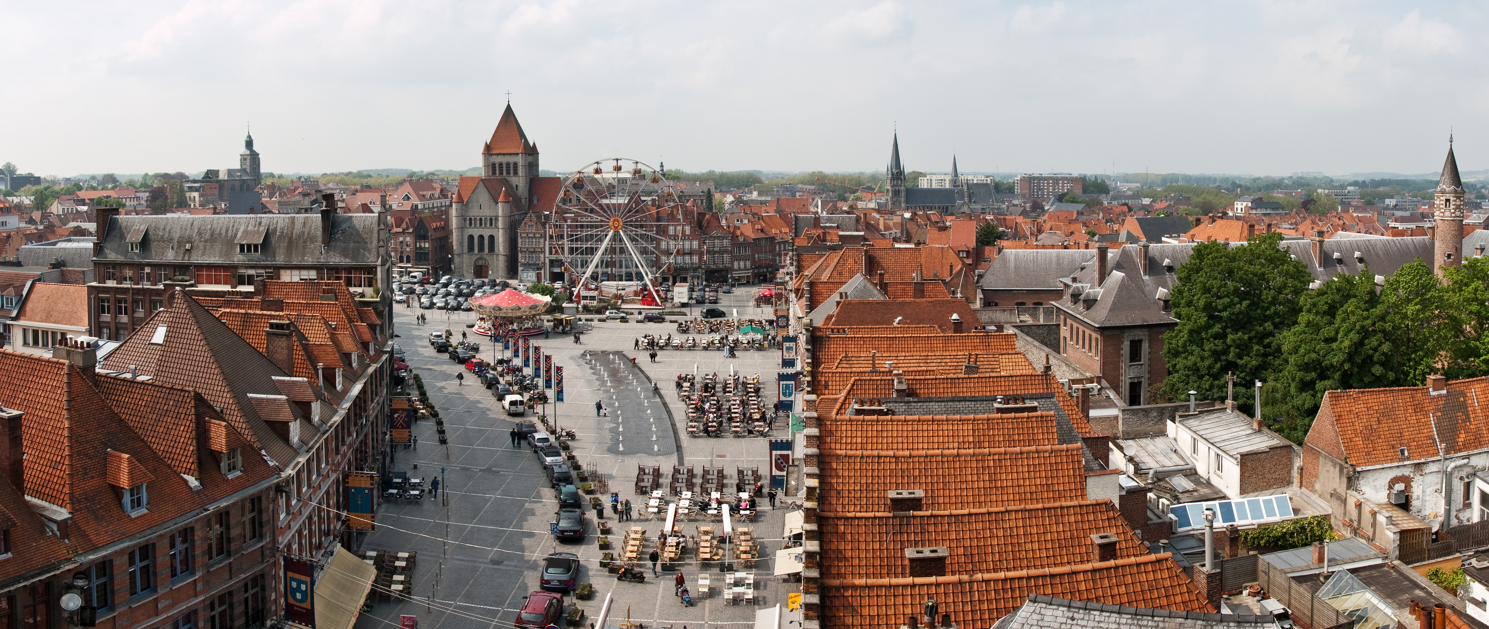 photo prise depuis le haut du beffroi